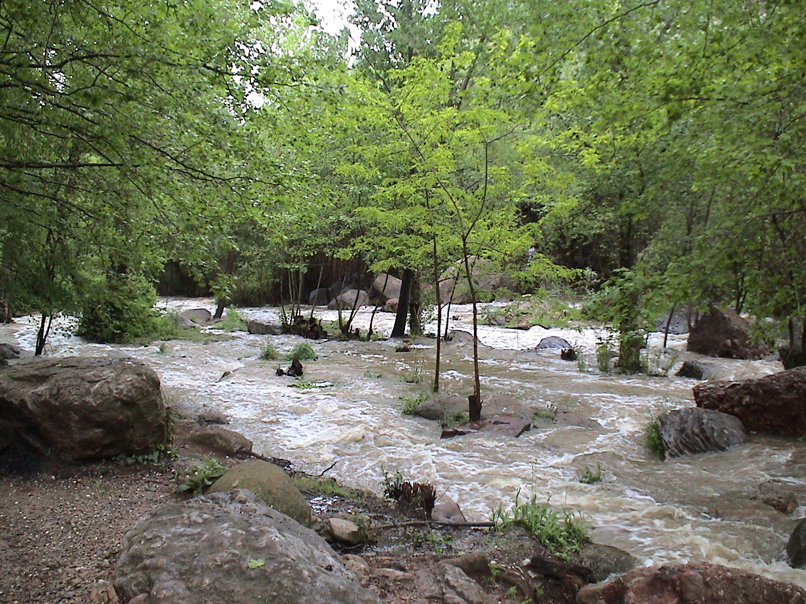 El Tenes, a la Font de la Pineda (Riells del Fai, Bigues i Riells, Vallès Oriental)